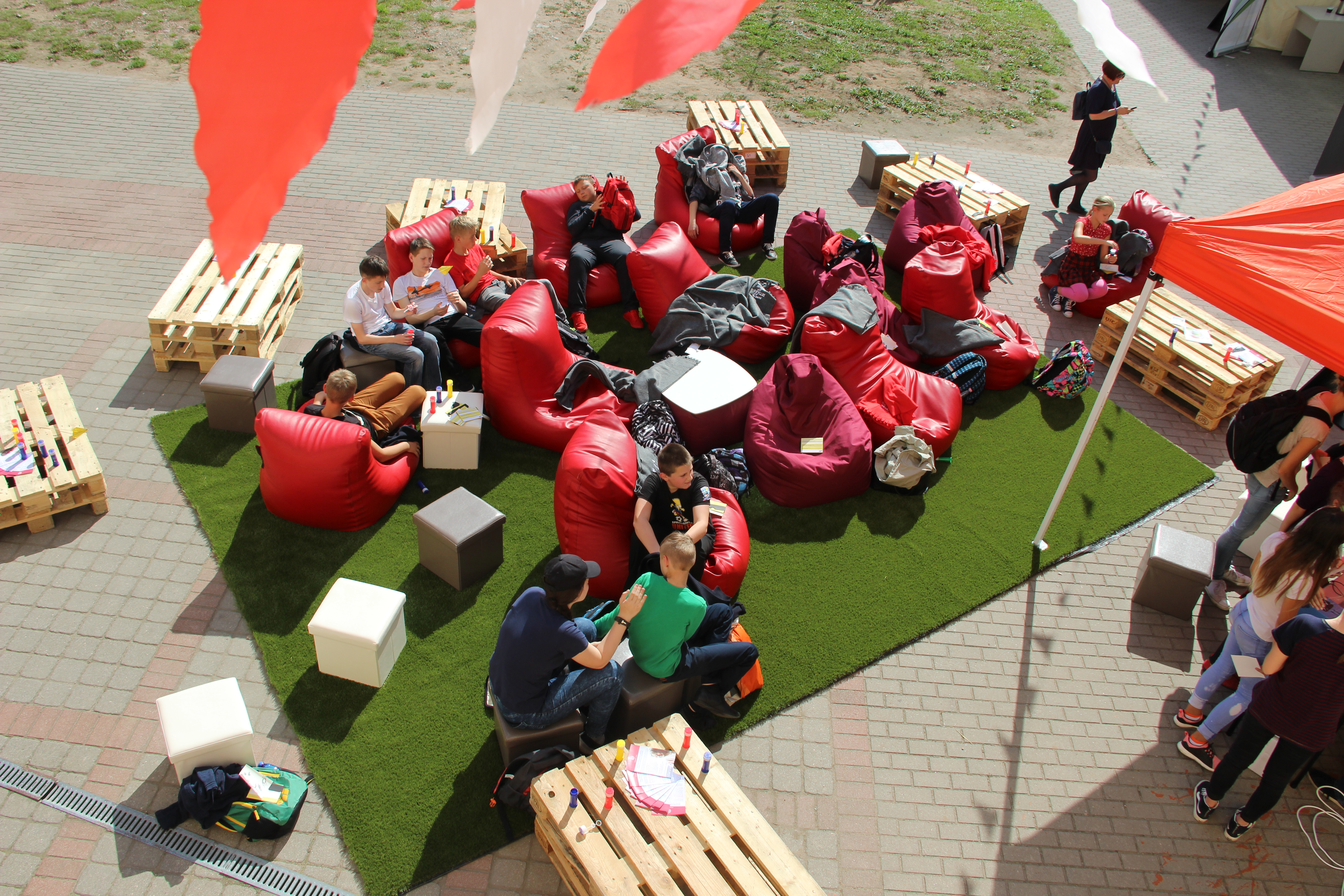 Biblioteka jau trečius metus iš eilės organizuoja Skaitymo festivalį bibliotekos vidiniame kieme. Pirmasis skaitymo festivalis įvyko 2015 metais. Kiekvienais metais Skaitymo festivalyje apsilanko apie 3000 skaitytojų ir įvyksta 50 renginių.